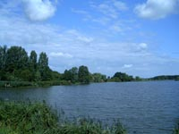 A kutasi halastó (szabad felhasználás, saját fotó)